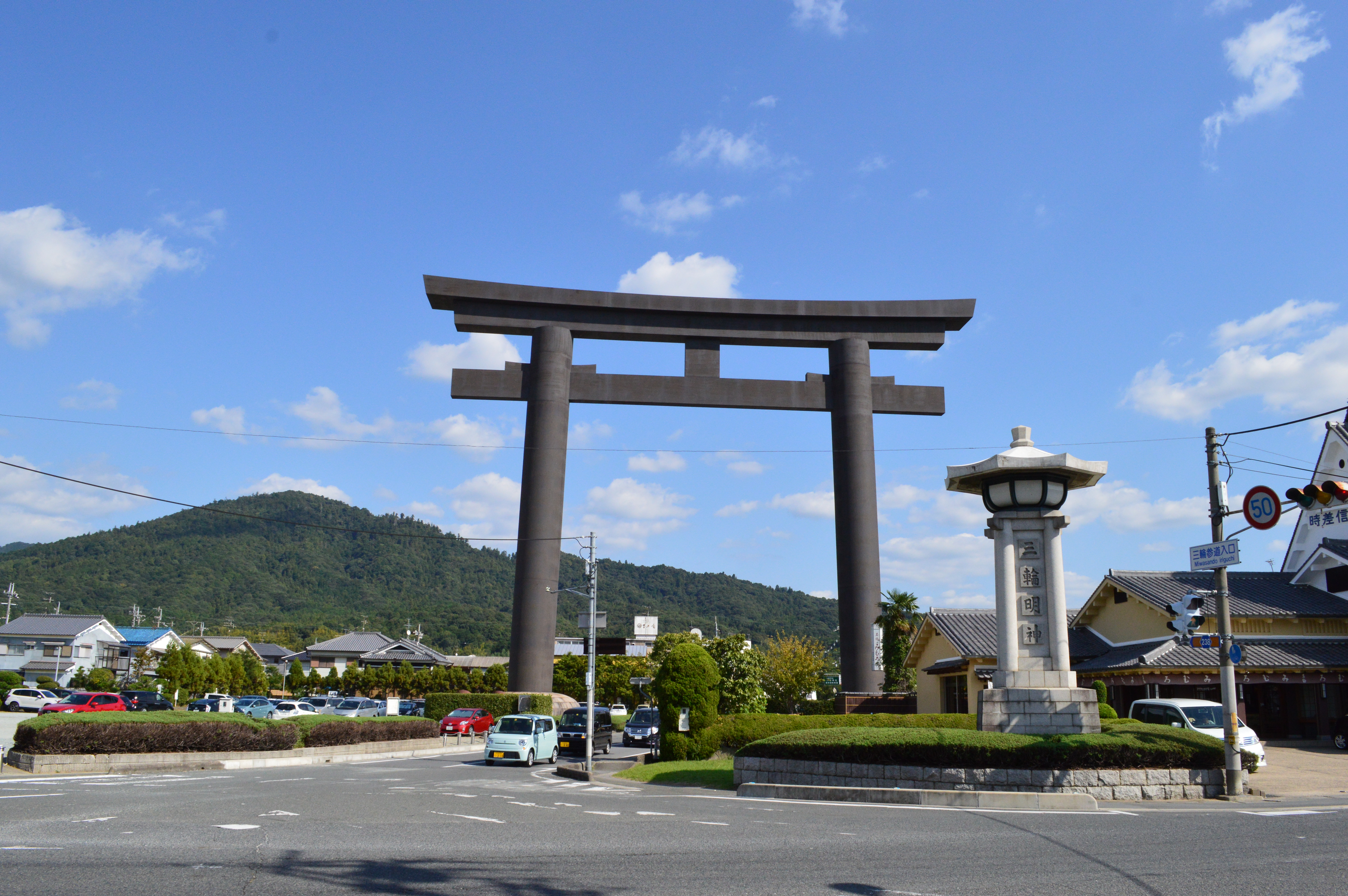 大神神社 大鳥居と三輪山